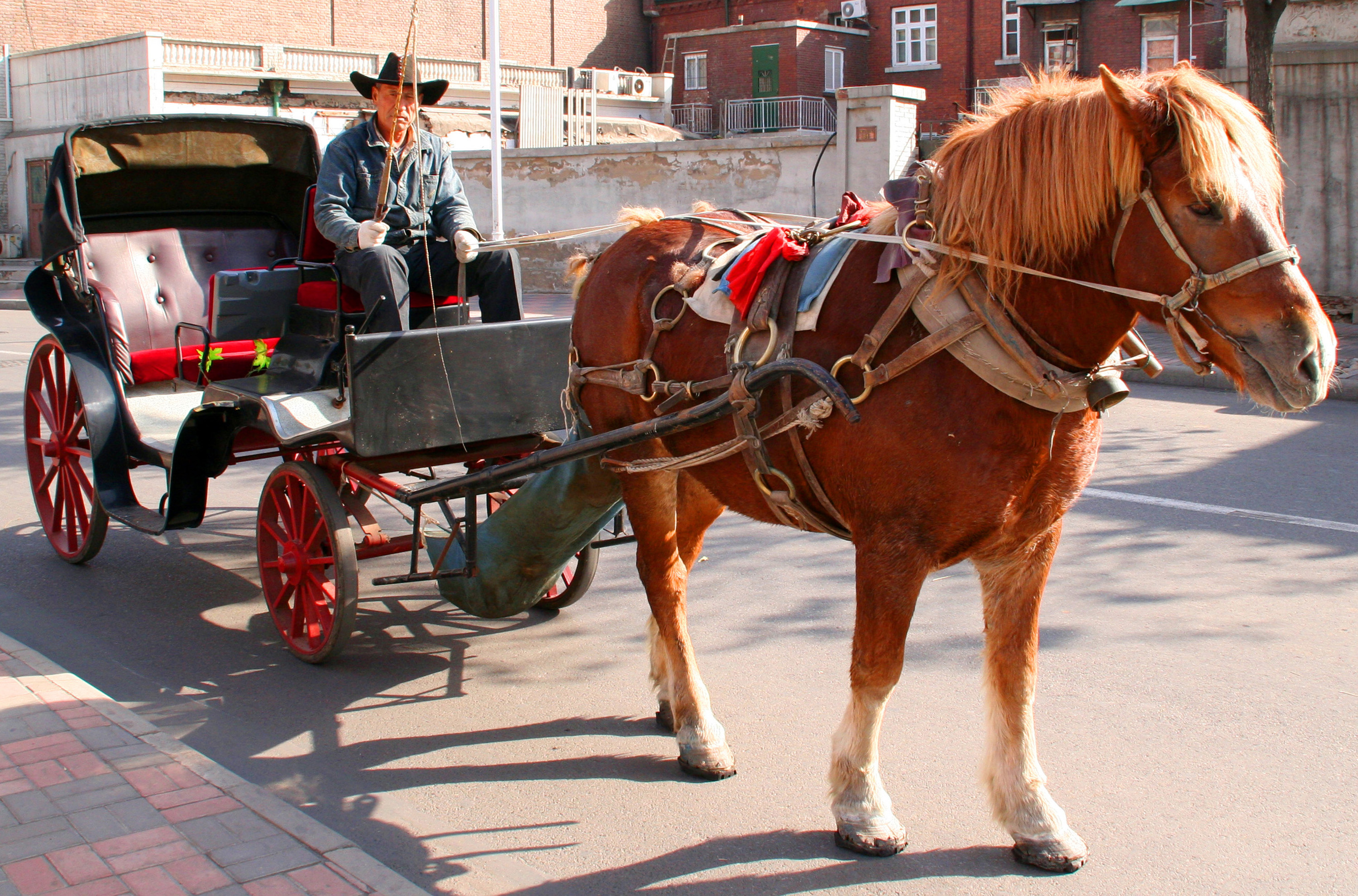 Attelage hippomobile à Tianjin, Chine